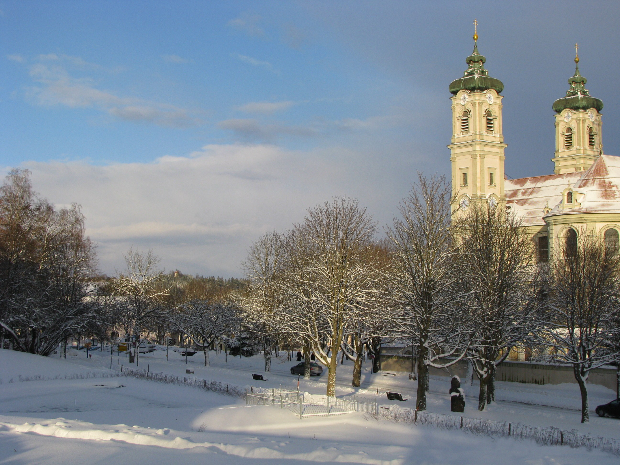 Die Ottobeurer Basilika im Winter vom Kurpark aus gesehen